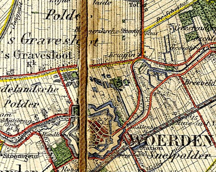 Detail van Topografische kaart van het gebied tussen Utrecht, Waddinxveen, Leimuiden en Hilversum uit 1892. Volgens de bijschriften aan de voorzijde van de kaart is het gebied verkend in 1850, waarna de kaarten zijn bijgewerkt in 1887, 1888 en 1892.